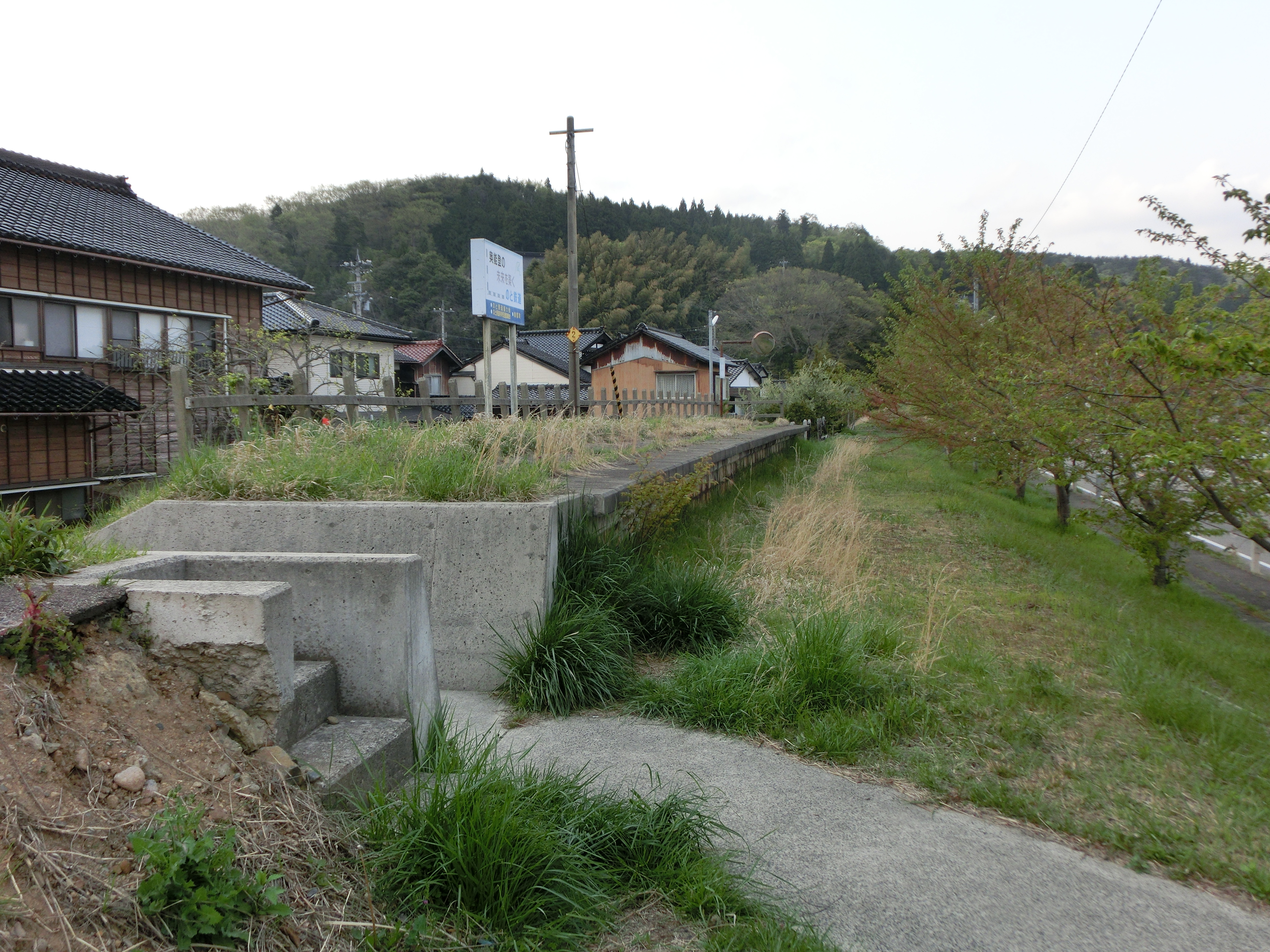 廃止後の矢波駅を七見方面より撮影(2017年4月)